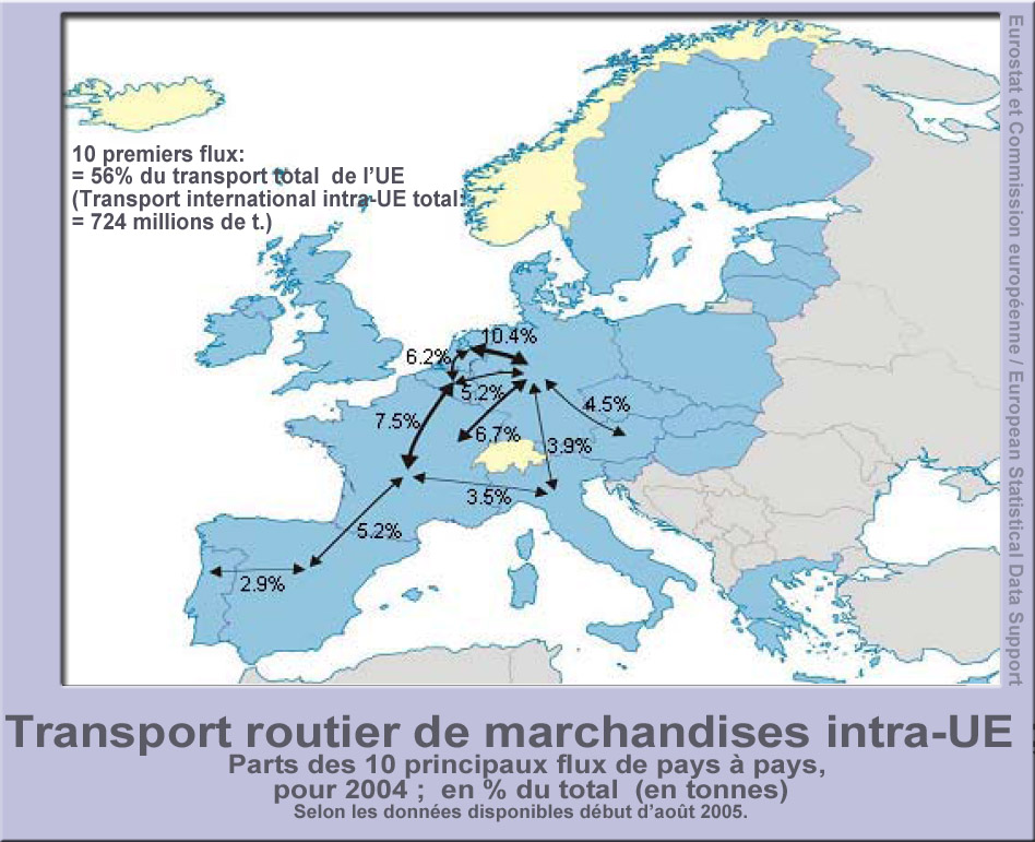 d'après [ Eurostat ; Transport routier de marchandises par provenance et destination en 2004 Les 10 principaux flux ont lieu entre les pays de l'UE-15] ; Statistiques en Bref ; Fin de rédaction: 08.12.2005 ; Données extraites le: 05.08.2005 ; ISSN 1562-1316 ; Numéro de catalogue: KS-NZ-05-010-FR-N (Bulletin : Statistiques en Bref, avec Copyright détenu par l'Union européenne, 1995-2011, précisant "Reproduction autorisée, moyennant mention de la source, sauf spécification contraire" )